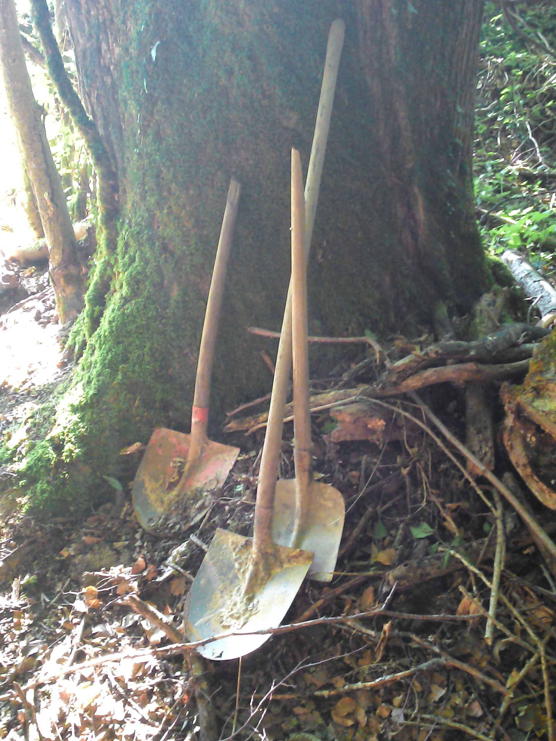 Schloßbückle in Baden-Württemberg, Landkreis Waldshut, Wutöschingen. Zuordnung ungeklärt. Konfiszierte Schaufeln von Schatzgräbern.